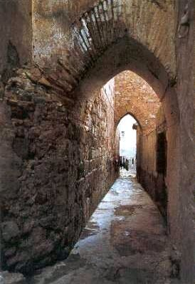 Callejón de Paniagua, Requena. Típico y famoso callejón moruno de La Villa, en el cual se pueden observar dos de los contrafuertes de la Iglesia de San Nicolás, montados sobre arcos apuntados de ladrillos.